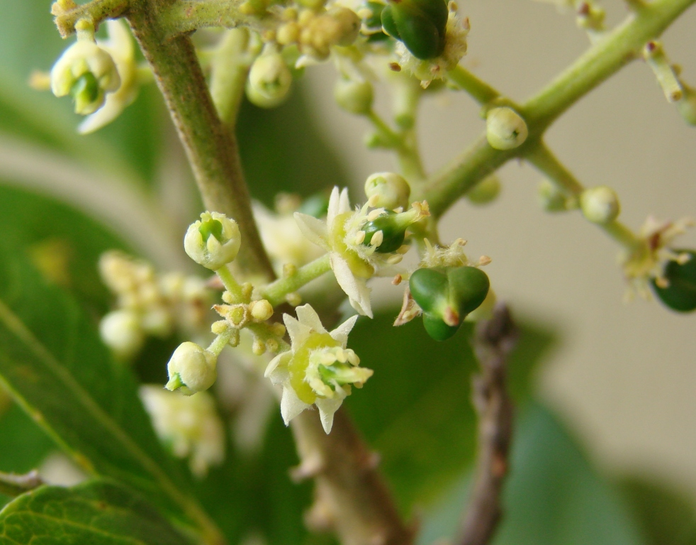 Sapindus saponaria L. - SAPINDACEAE - SQN 311 - Brasília - Distrito Federal - Brasil.